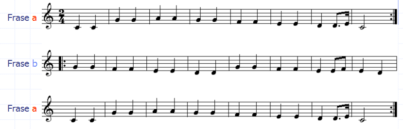 forma ternària de la Cançó popular francesa vous dirai je maman